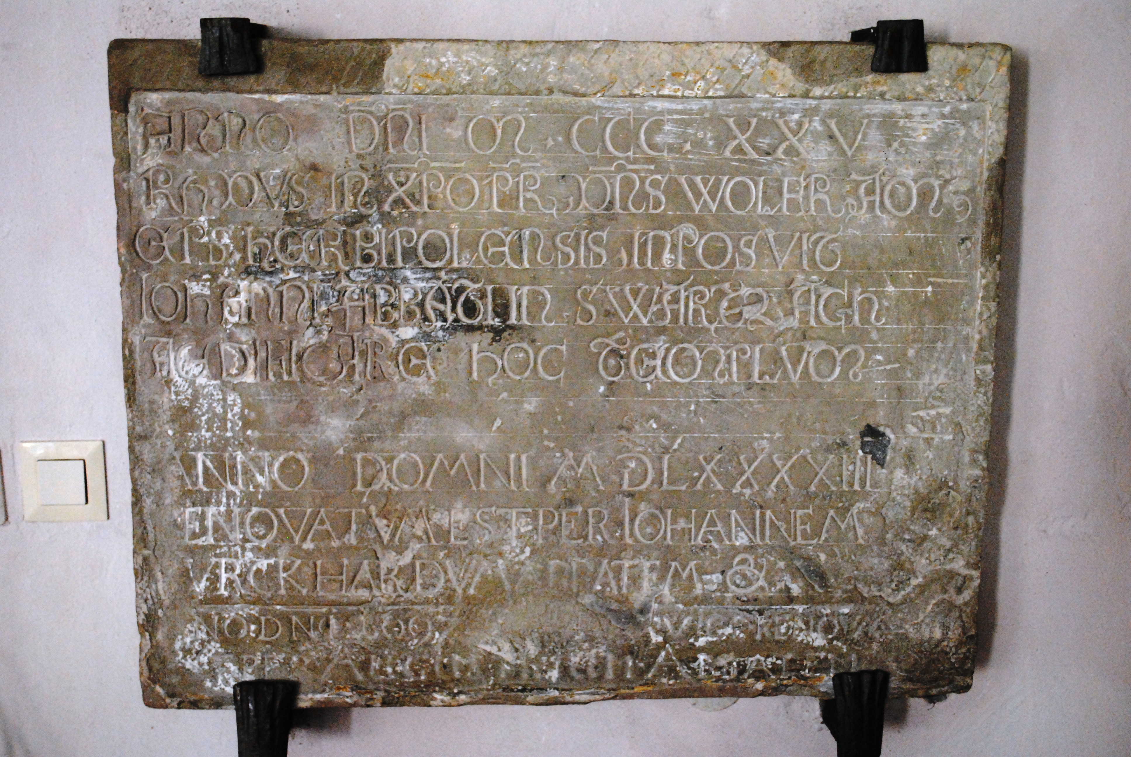 Kirche Dimbach, Volkach, Steinplatte und Inschrift